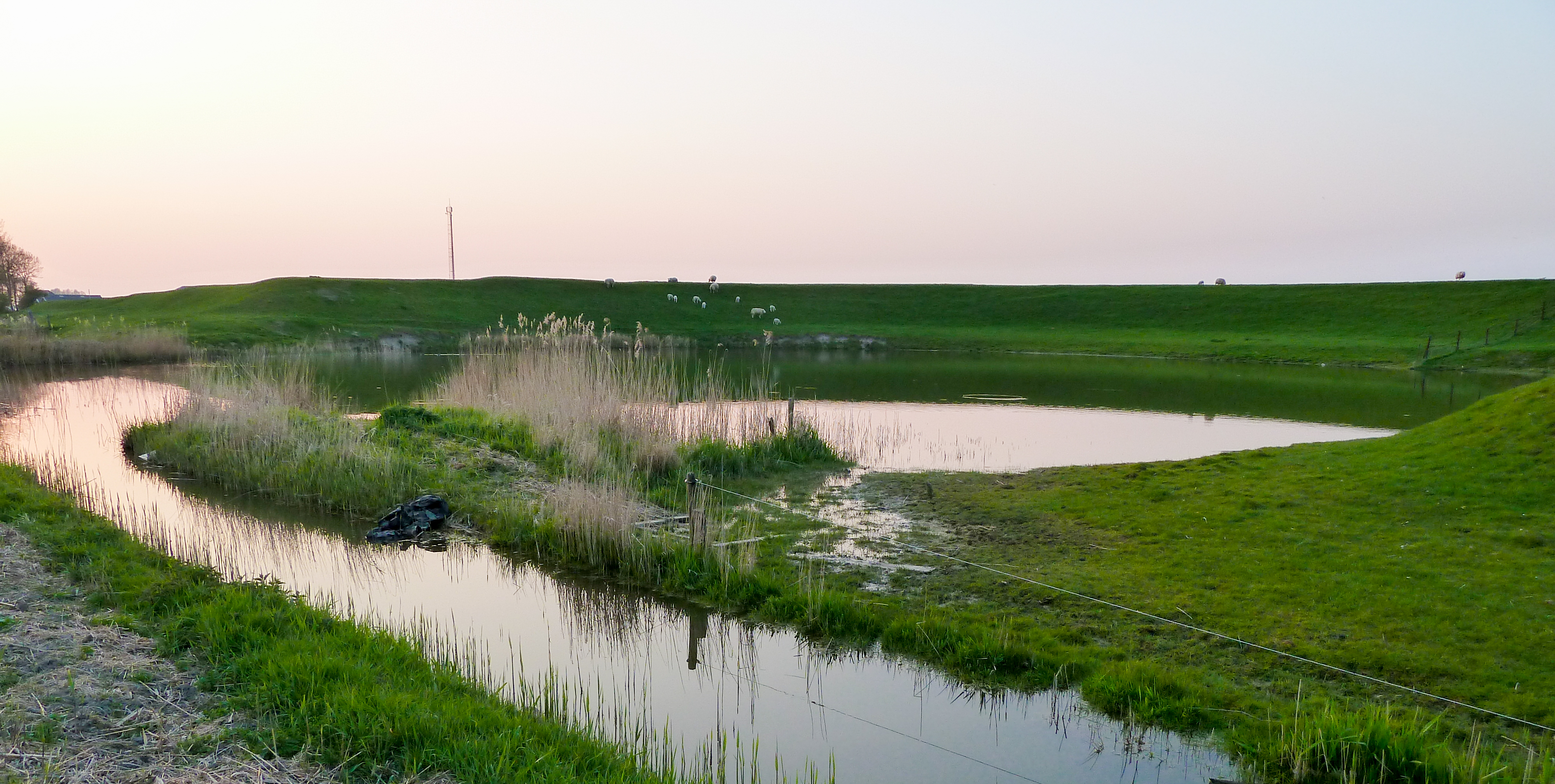 Schevekolk gezien vanuit het noordoosten